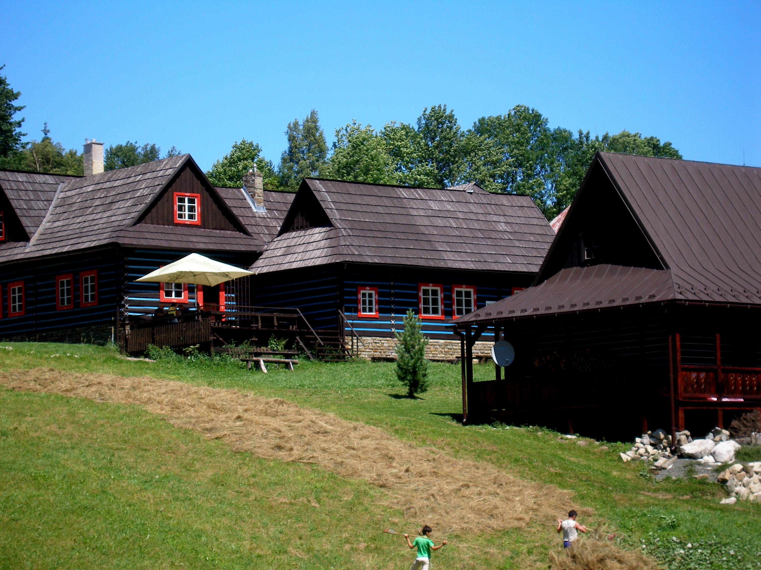 Intravilán rázovitej podtatranskej obce Ždiar.